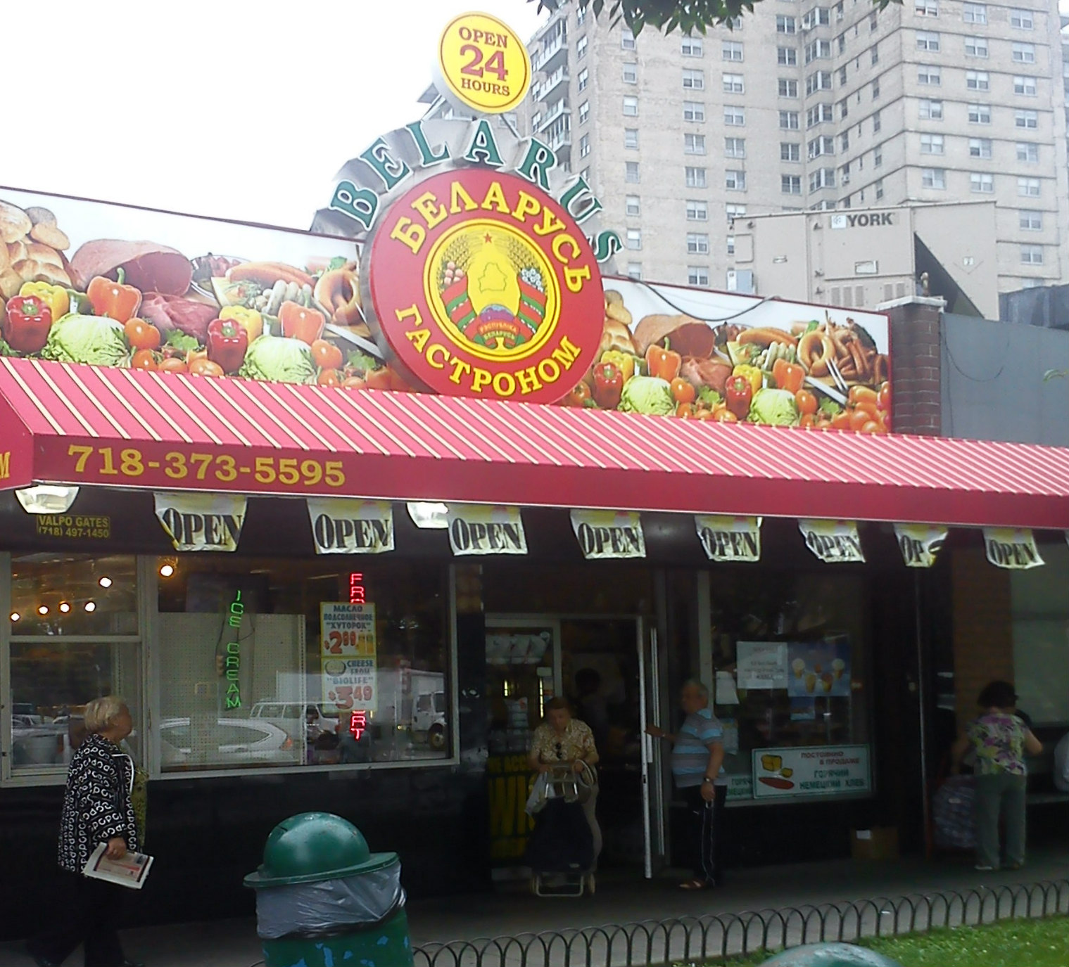 Беларуская (тарашкевіца): Дзяржаўныя ўстановы Беларусі і ў ЗША ня ўмеюць пісаць па-беларуску